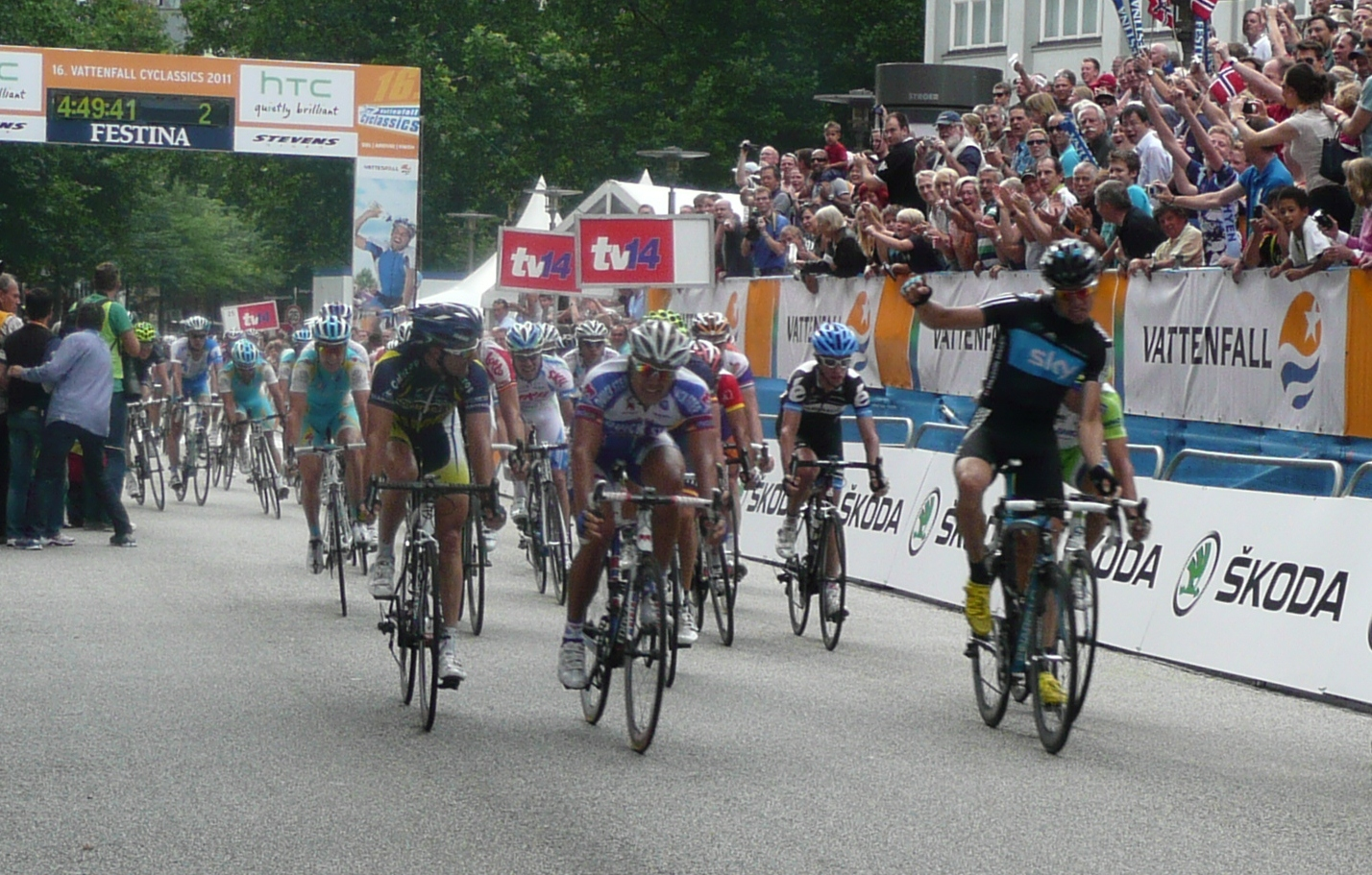 Vattenfall Cyclassics 2011 Zielankunft